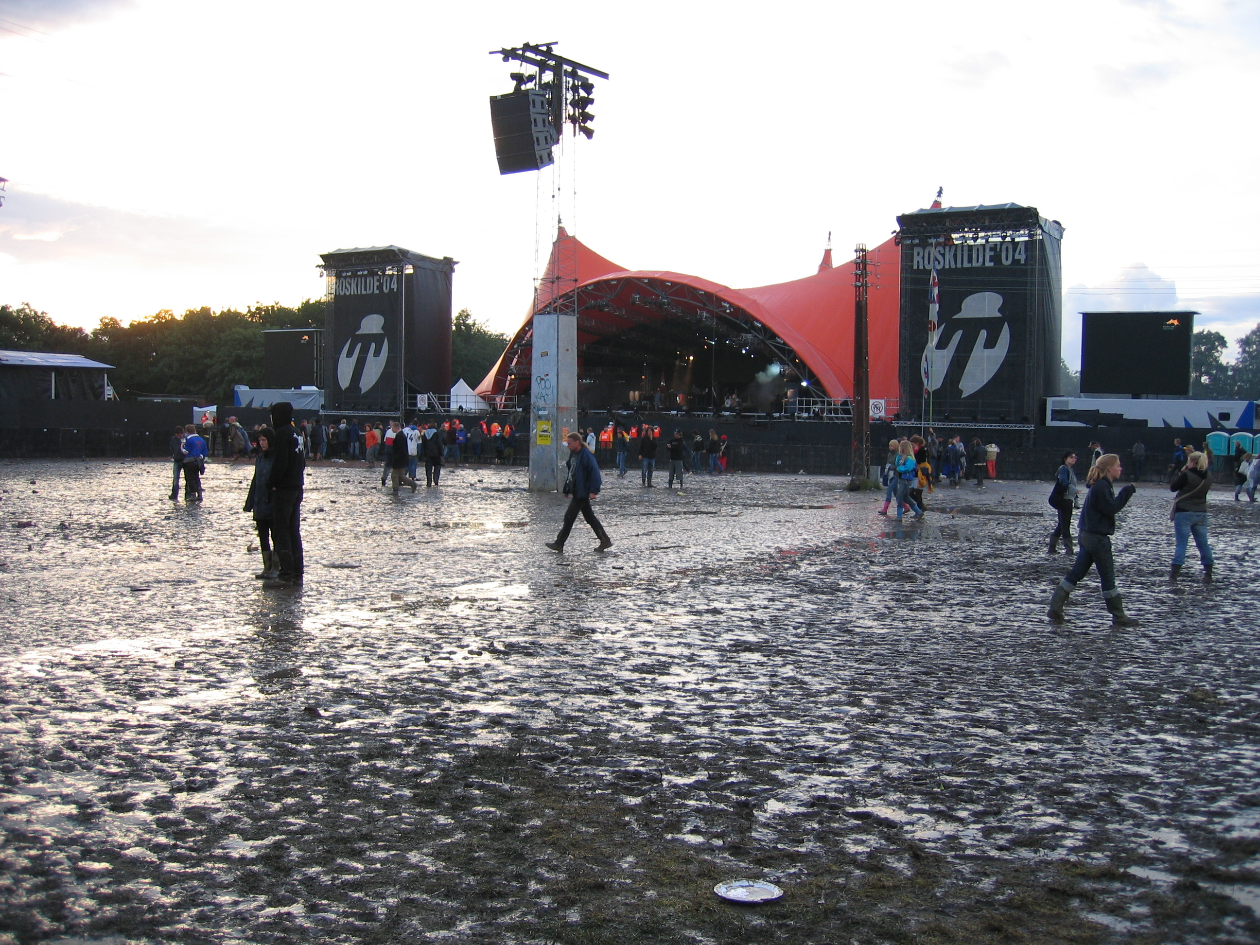 Roskilde Festival